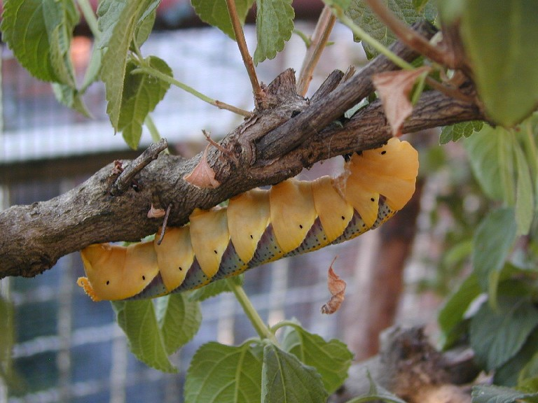 Bruco Acherontia atropos Foto scattata a Roma il 18.7.04